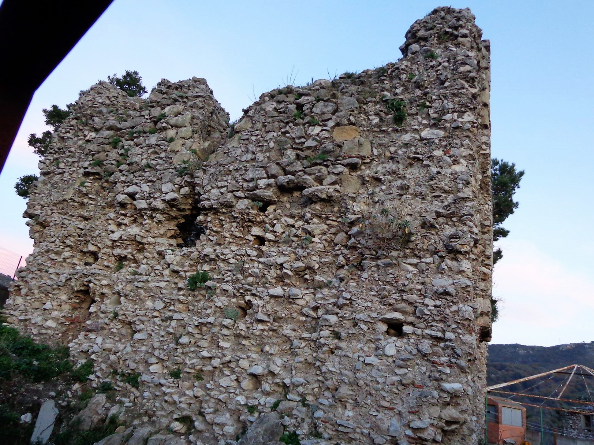 Castello di Novara di Sicilia, ruderi. Natale 2015, scatto già presente su profilo personale FB.